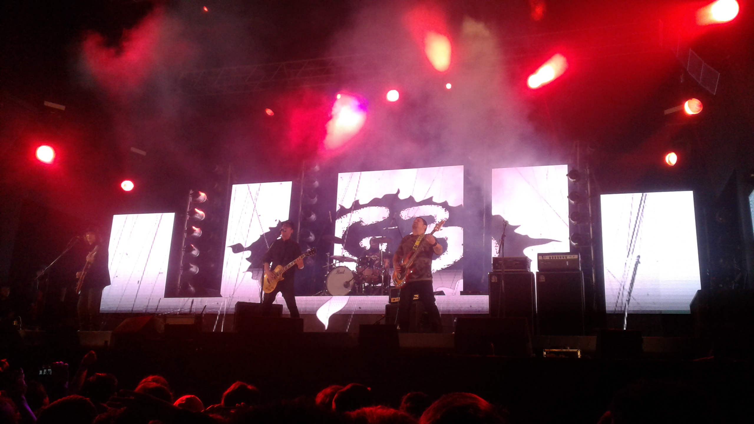 G¤3 en concieeto del Día del Rock Peruano, 2018.